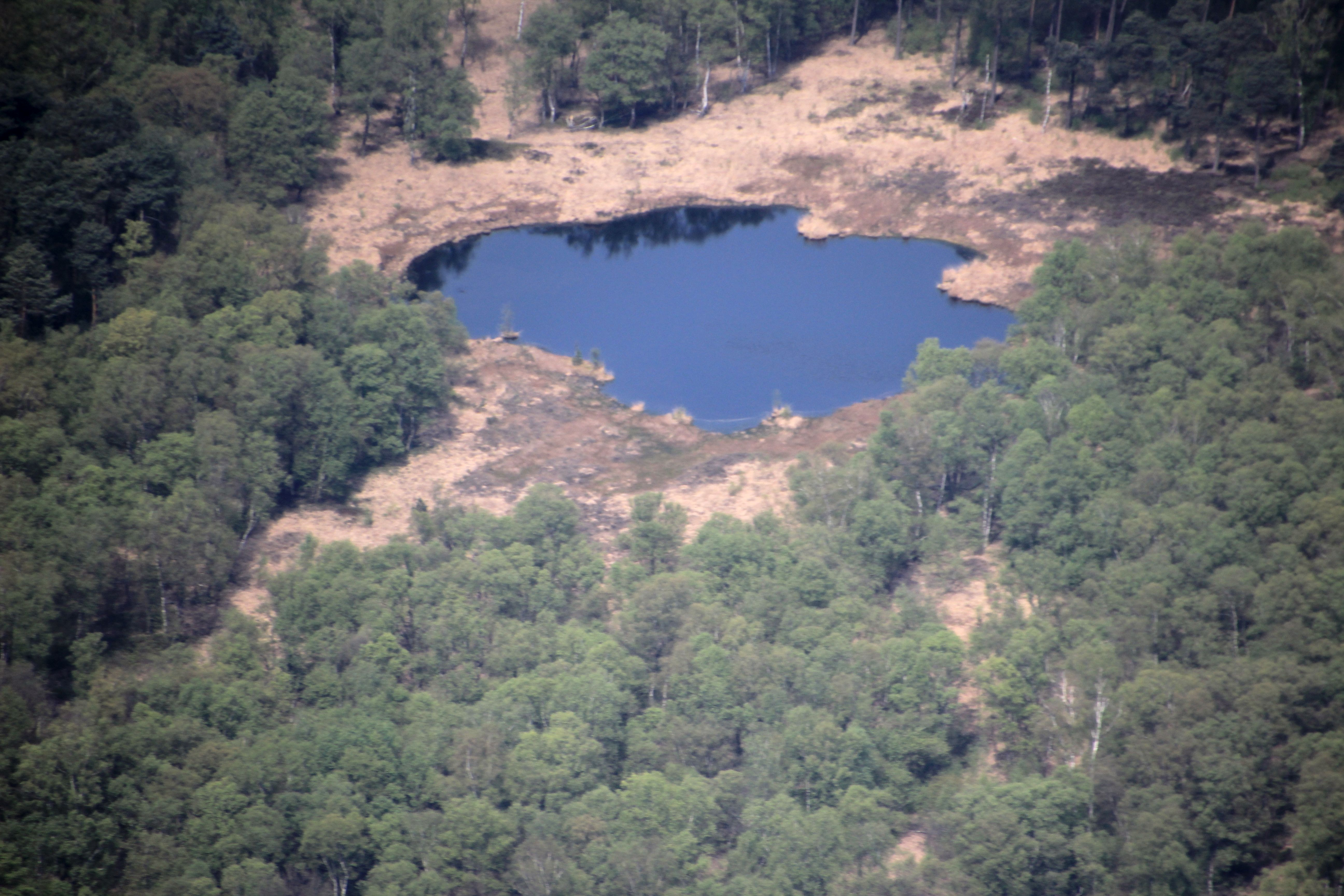 Die Aufnahme entstand während des Münsterland-Fotoflugs am 12. April 2014.